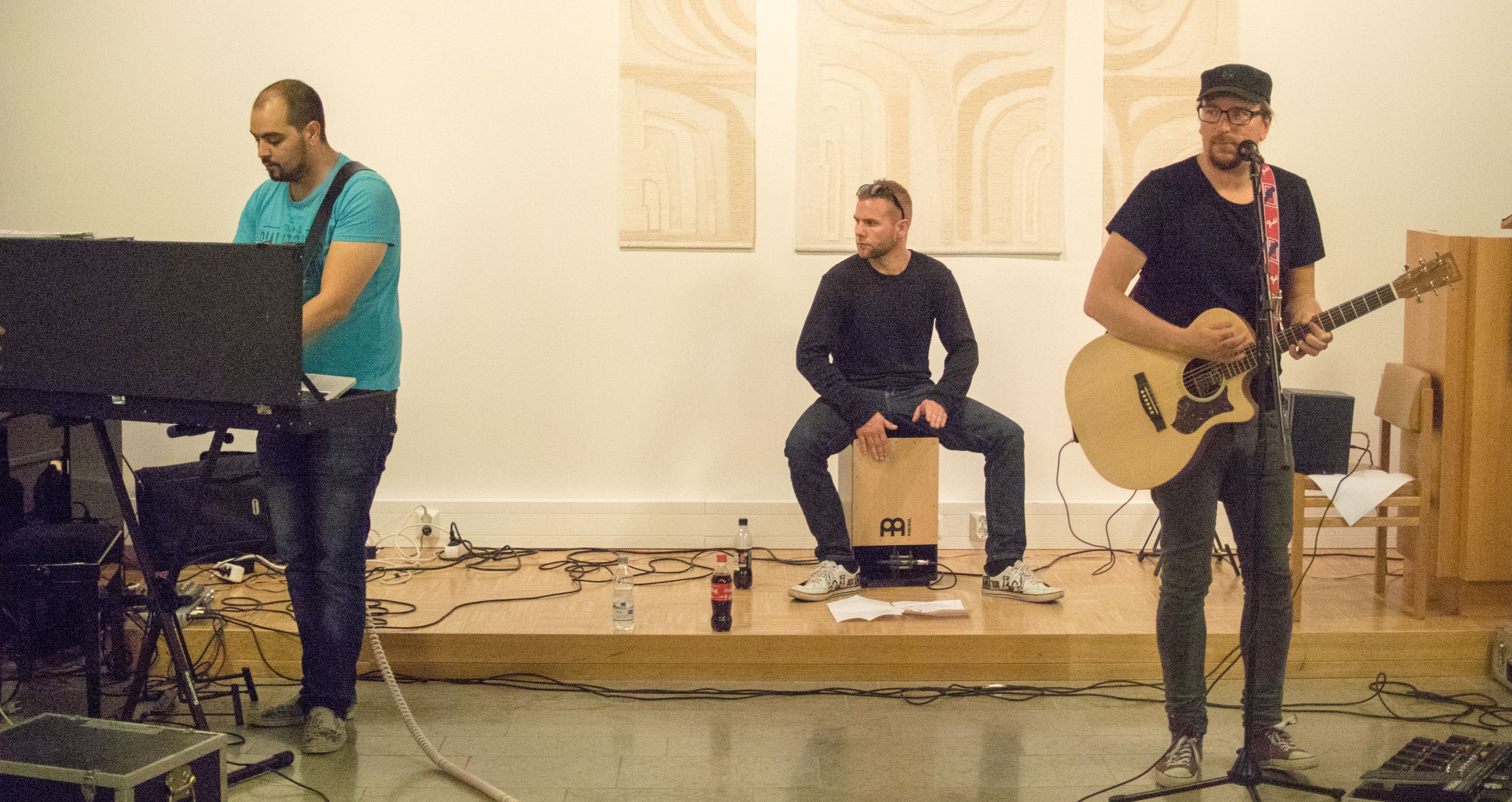 No Man's Band yhdellä alkuperäisjäsenellä ja kahdella sairastapus tuuraajalla varustettuna